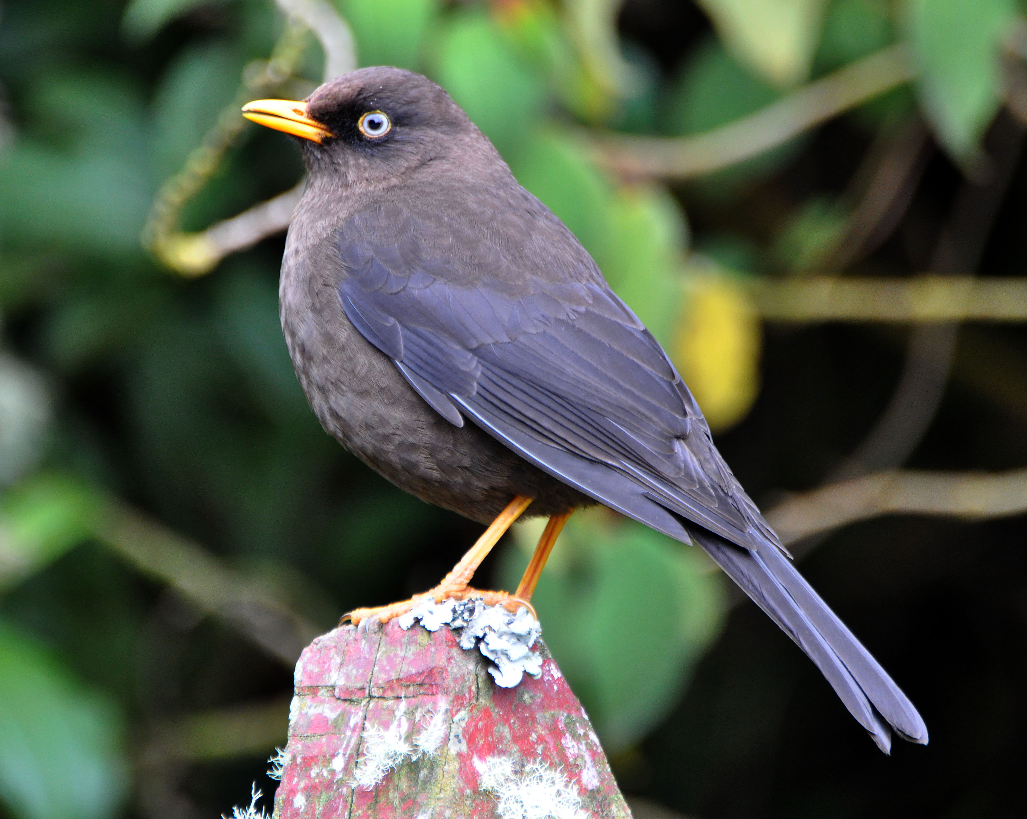 Turdus nigrescens 26-Mar-12 Paraiso Quetzal, Costa Rica